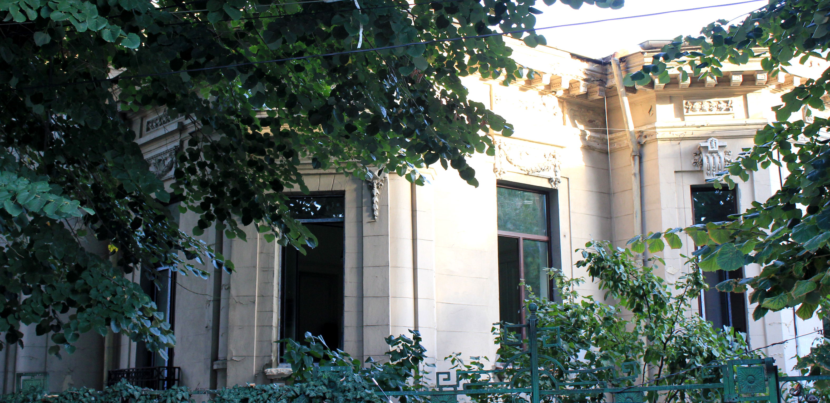 Casa Romano Alexandru 28 in renovare